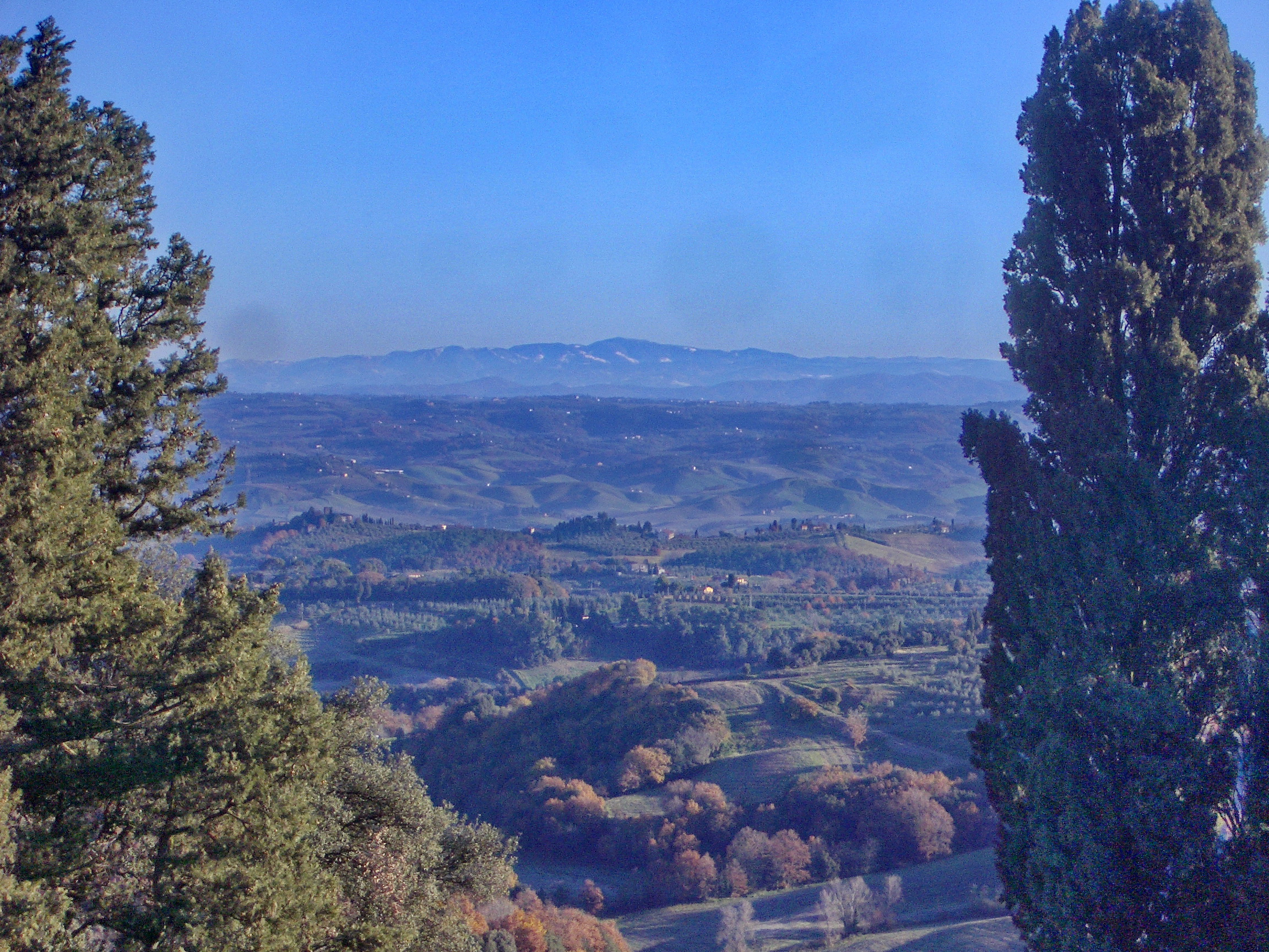 Valdelsa (Elsa valley) seen from Filicaja Estates in Montaione (Florence), Italy.